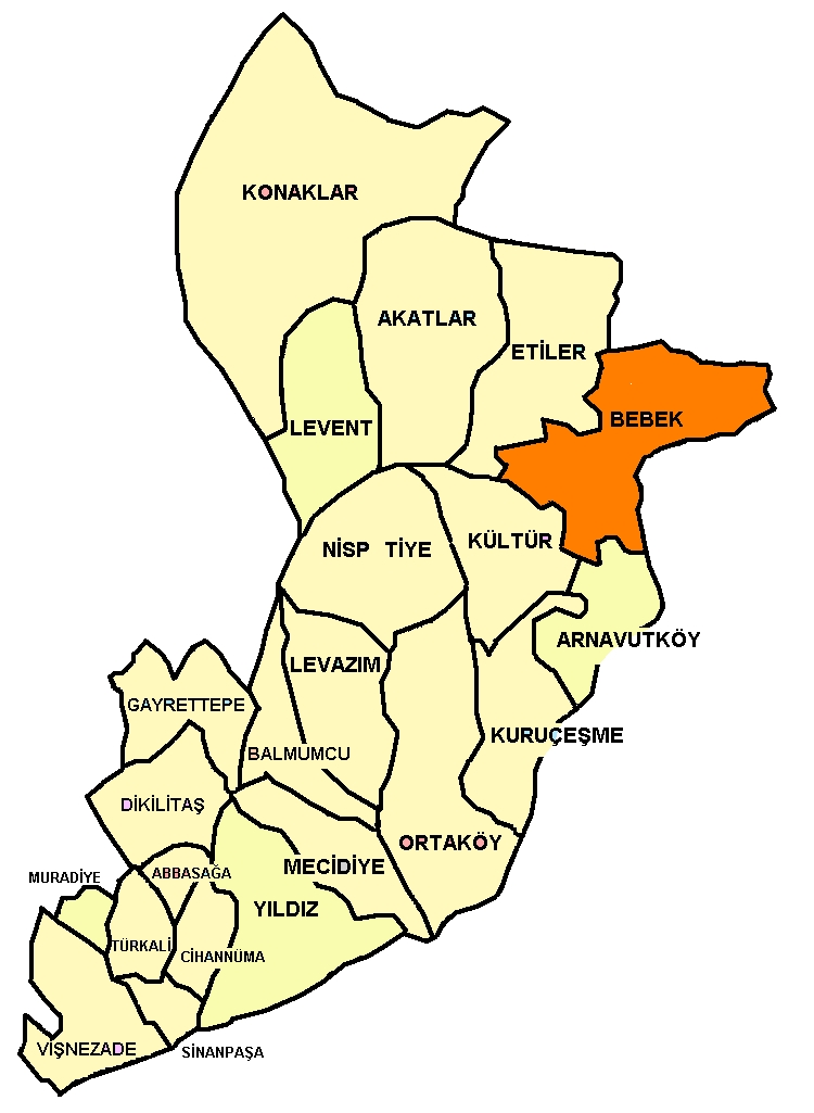 [1] kaynağından yararlandım ama kendim yaptım.